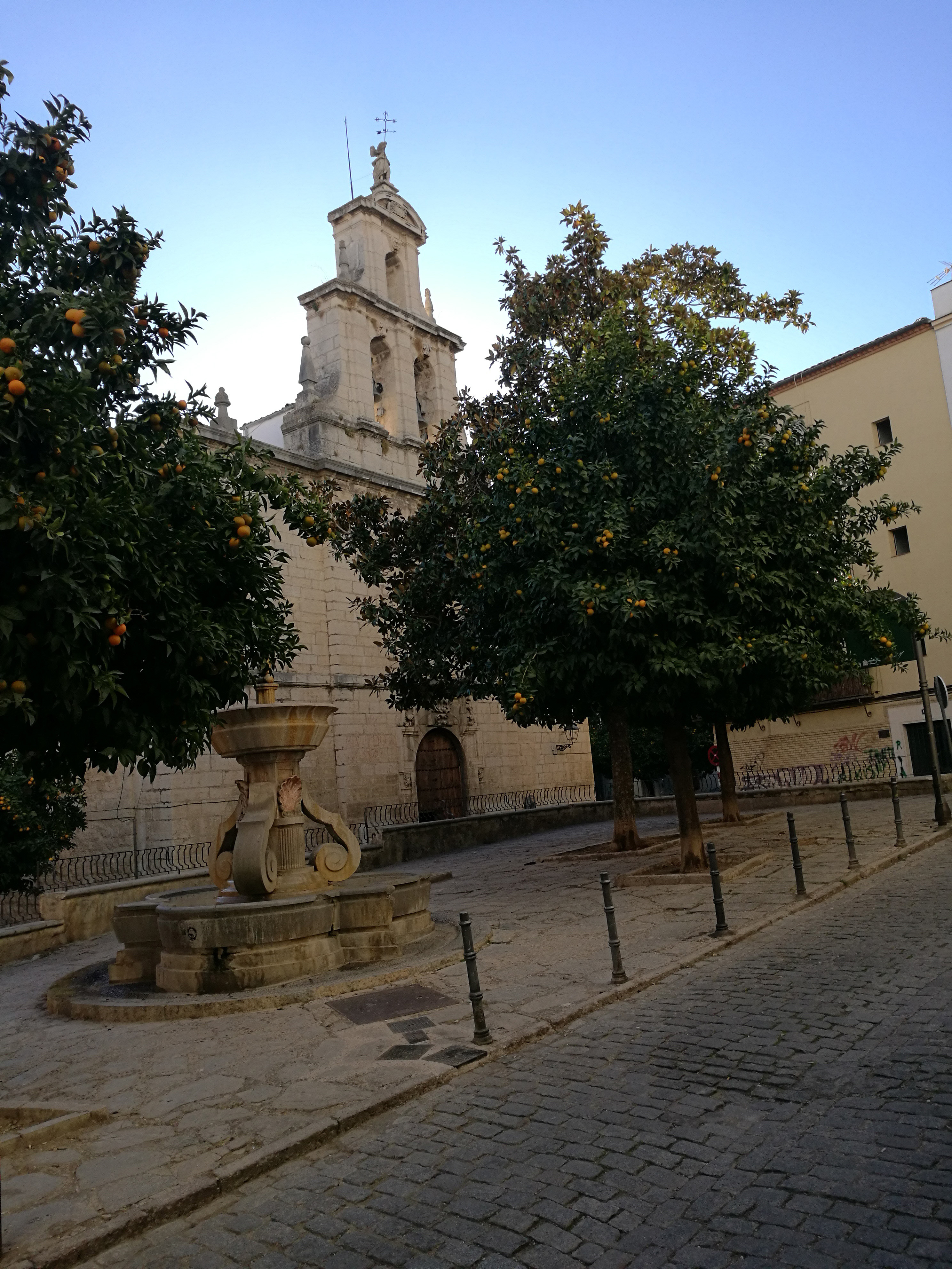 Plaza típica de Jaén en la que se encuentra la iglesia de este nombre